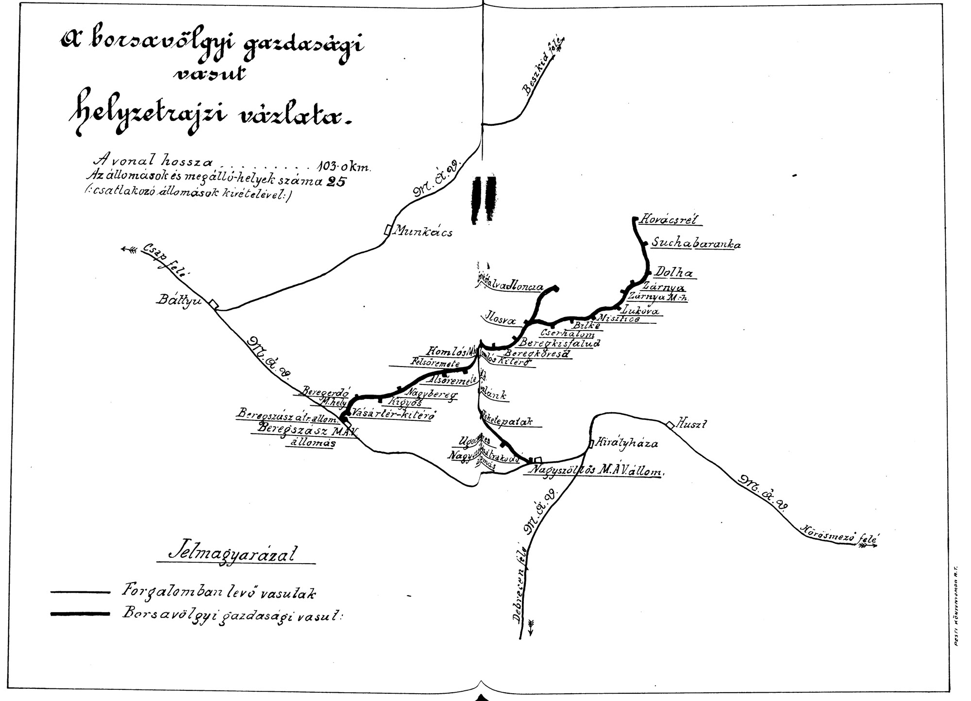 карта узкоколейки